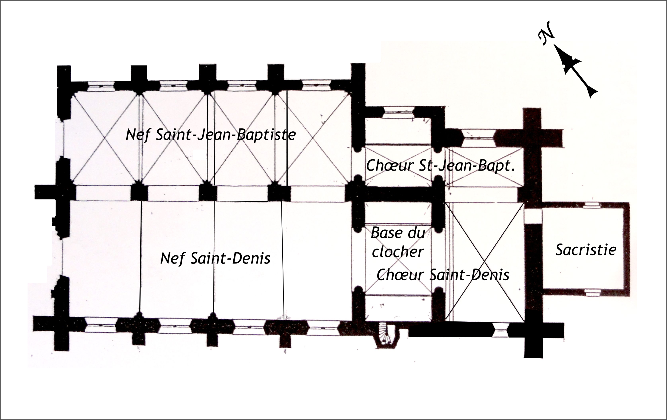 Plan de l'église. Il n'est pas juste et la représentation de la base du clocher ne correspond pas à la réalité.